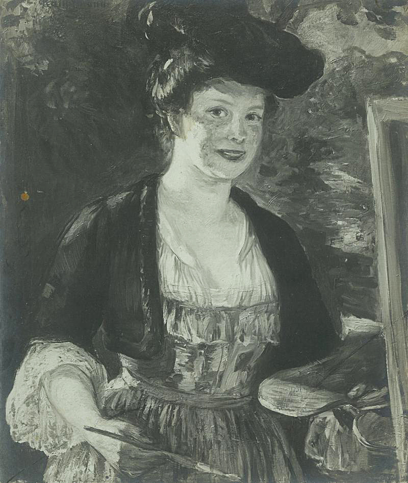 Eugenie-Hauptamnnova-Sommerova - Autoportrét